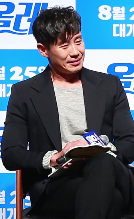 (TV10) 박희순, 박에진 사랑도 1등 女후배 사랑도 1등 (영화 올레 제작발표회)